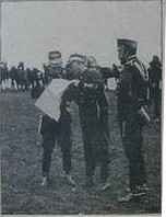 vue des Grandes manoeuvrves de l'est de 1901 dans "le Petit journal militaire maritime et colonial ".